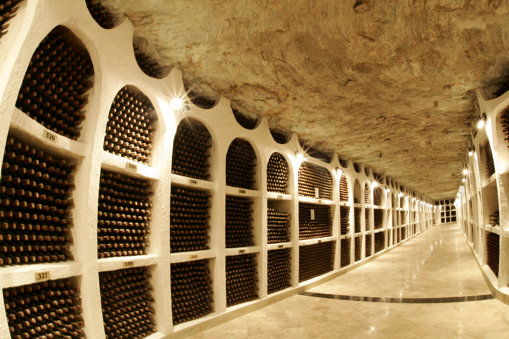 Vinoteca din beciurile Cricova